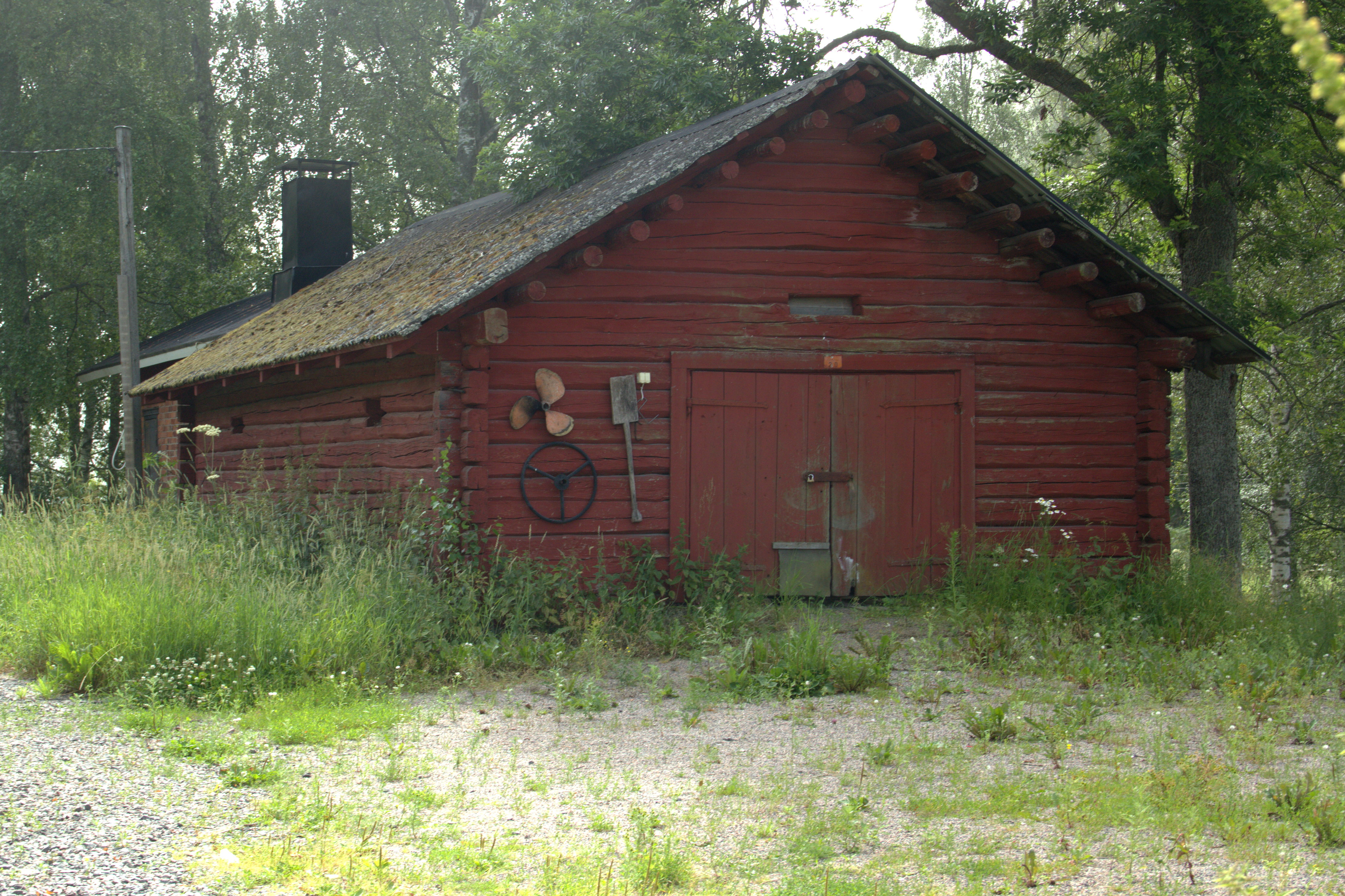 Hirsinen piharakennus Skatan tilalla